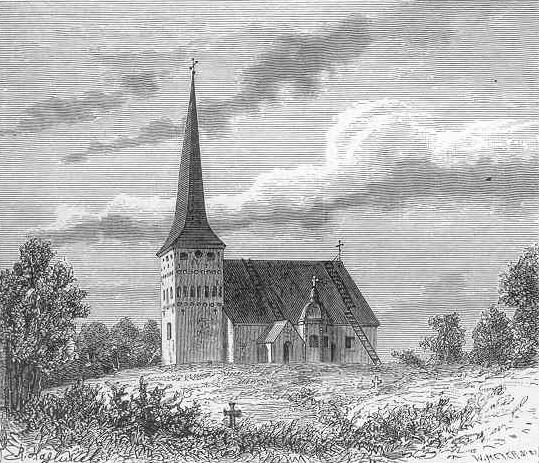 Romfartuna kyrka. Avbildning i "Sveriges historia III", skriven av Oskar Alin, tryckt i Stockholm 1889, sidan 40.